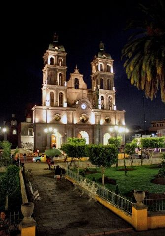 Foto tomada desde el parque de la Ciudad de Teziutlan, Puebla